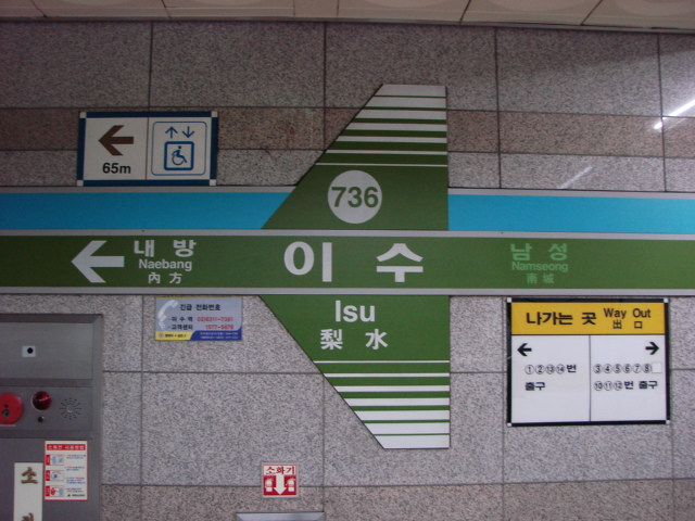 서울 지하철 7호선 이수역 명판